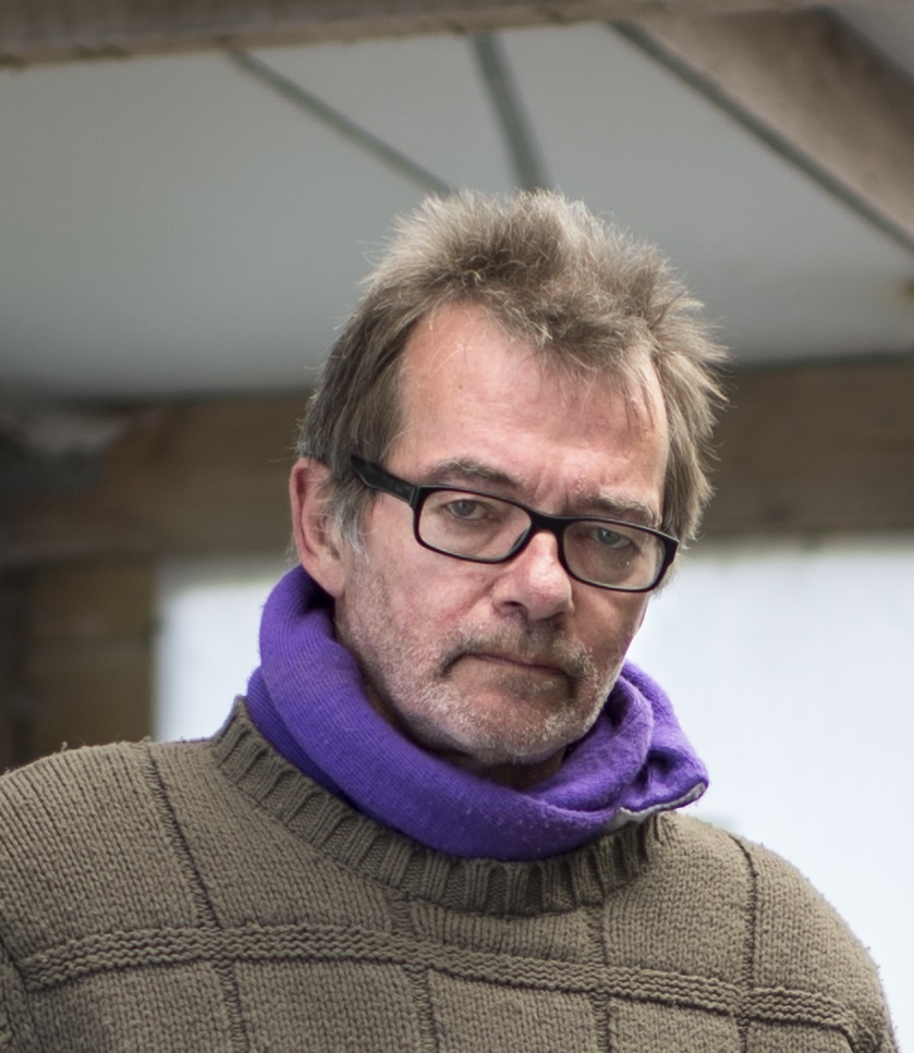 Patrick crombé, Belgisch beeldhouwer